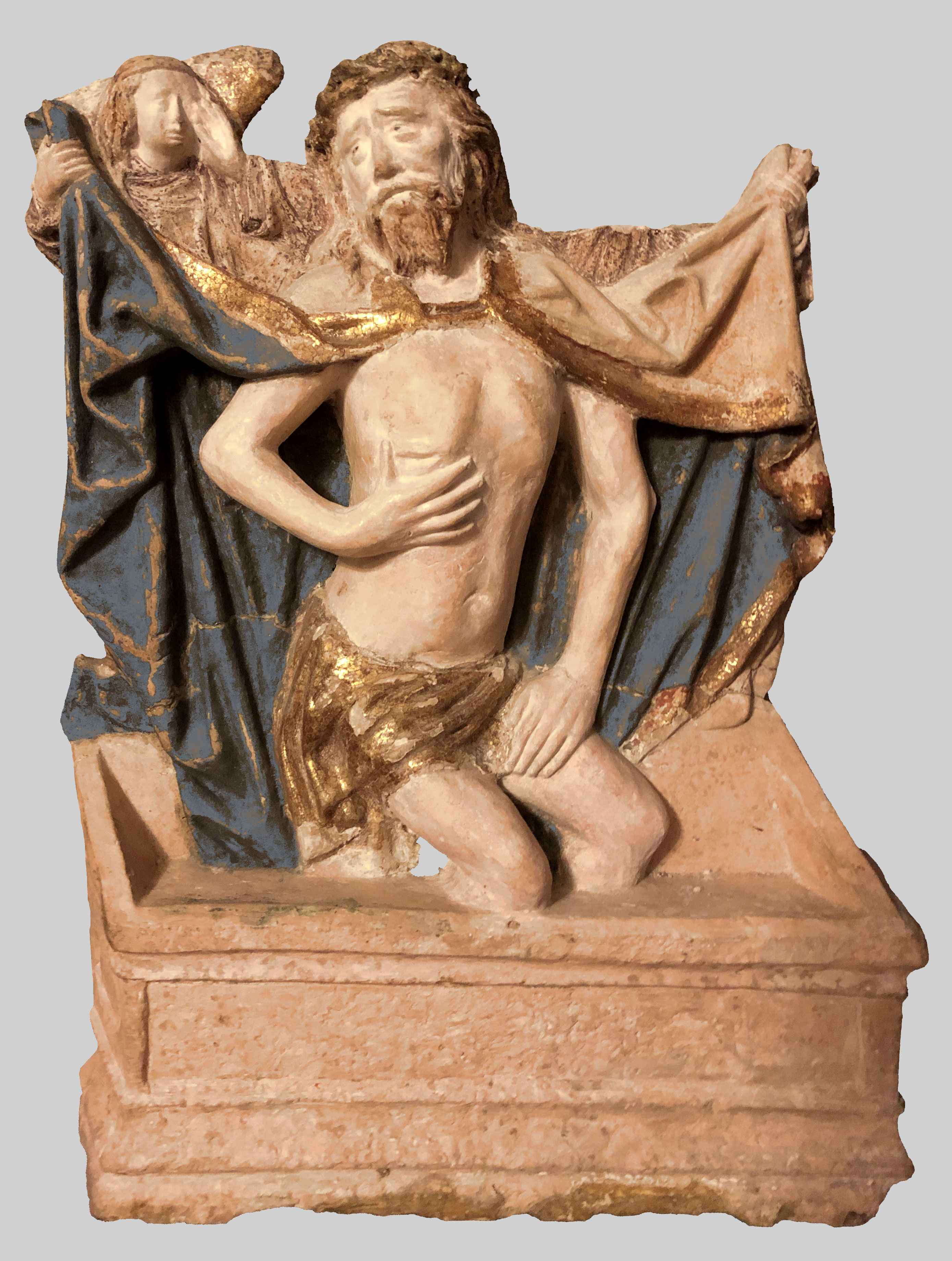 Engel-Pietà, 15. Jh., Norditalien; Terracotta